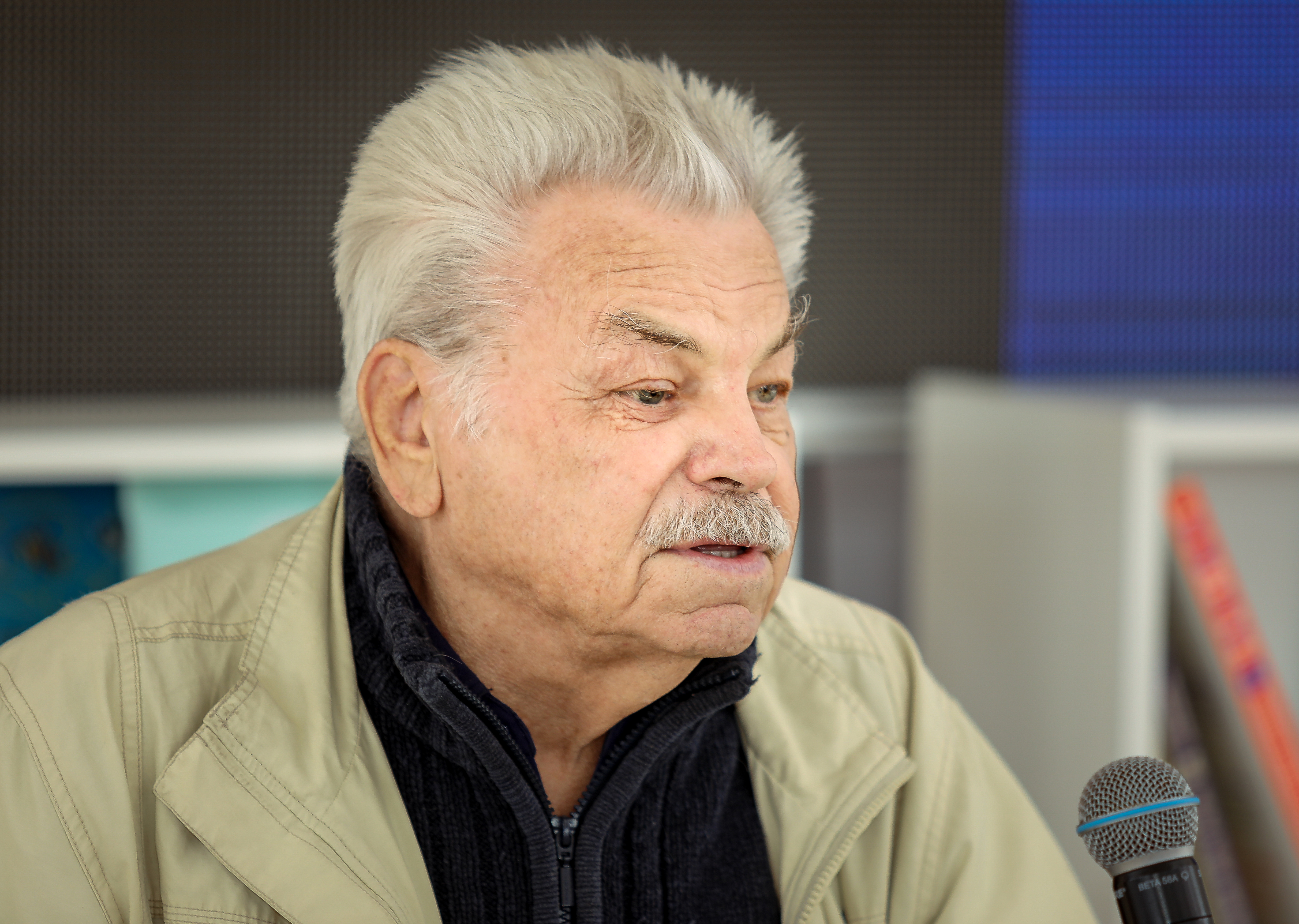 Анатолий Михайлович Елисеев (Народный художник РФ) на книжном фестивале "Красная площадь"-2017.